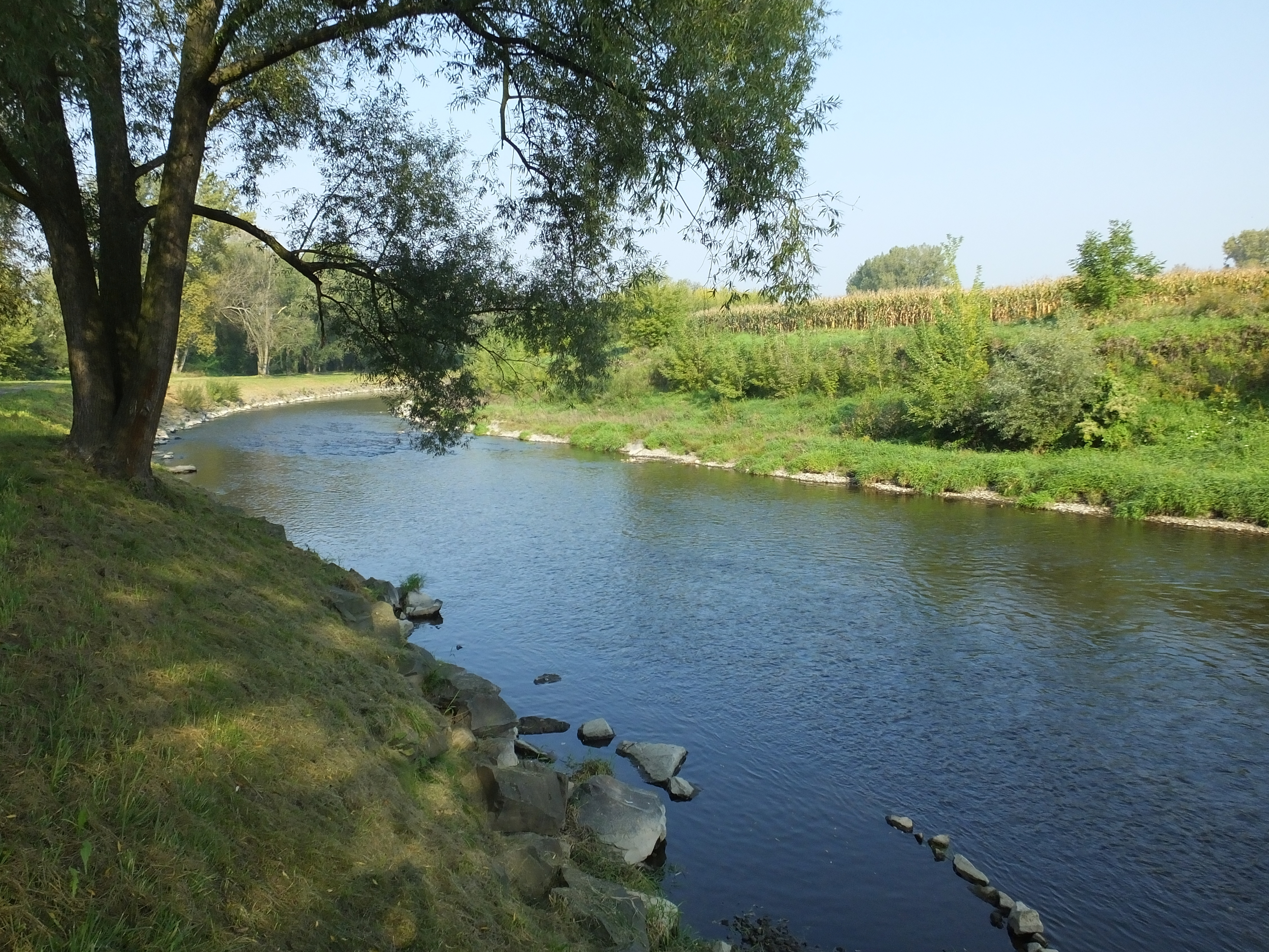 Rzeka Olza pomiędzy wsią Olza a Kopytowem, częścią Bogumina